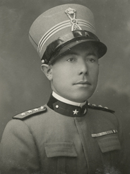 Antonio Callea (1894 – 1939) in tenuta da ufficiale